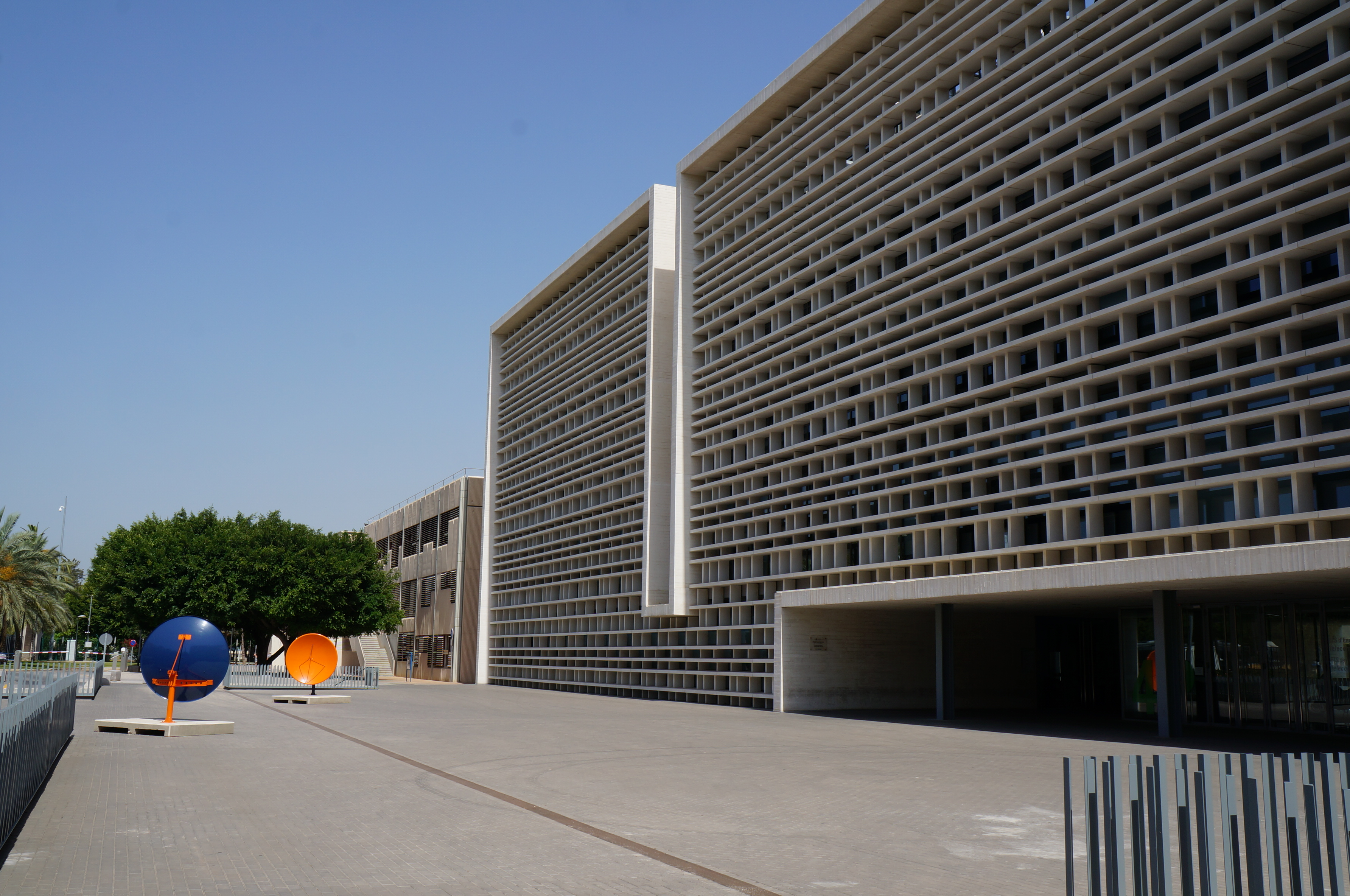 Escuela Técnica Superior de Ingenieros de Telecomunicación - TelecomVLC- de la Universitat Politècnica de València - UPV